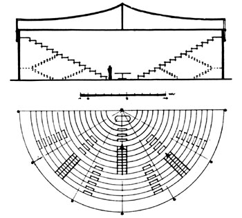 Plan du théâtre anatomique imaginé par Charles Estienne paru dans une édition du De dissectione partium corporis publiée à Paris en 1546.